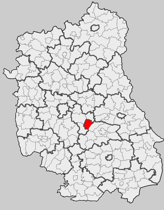 Map of gmina Fajsławice, Krasnystaw county, Lublin voivodship Mapa gminy Fajsławice, powiat krasnostawski, województwo lubelskie